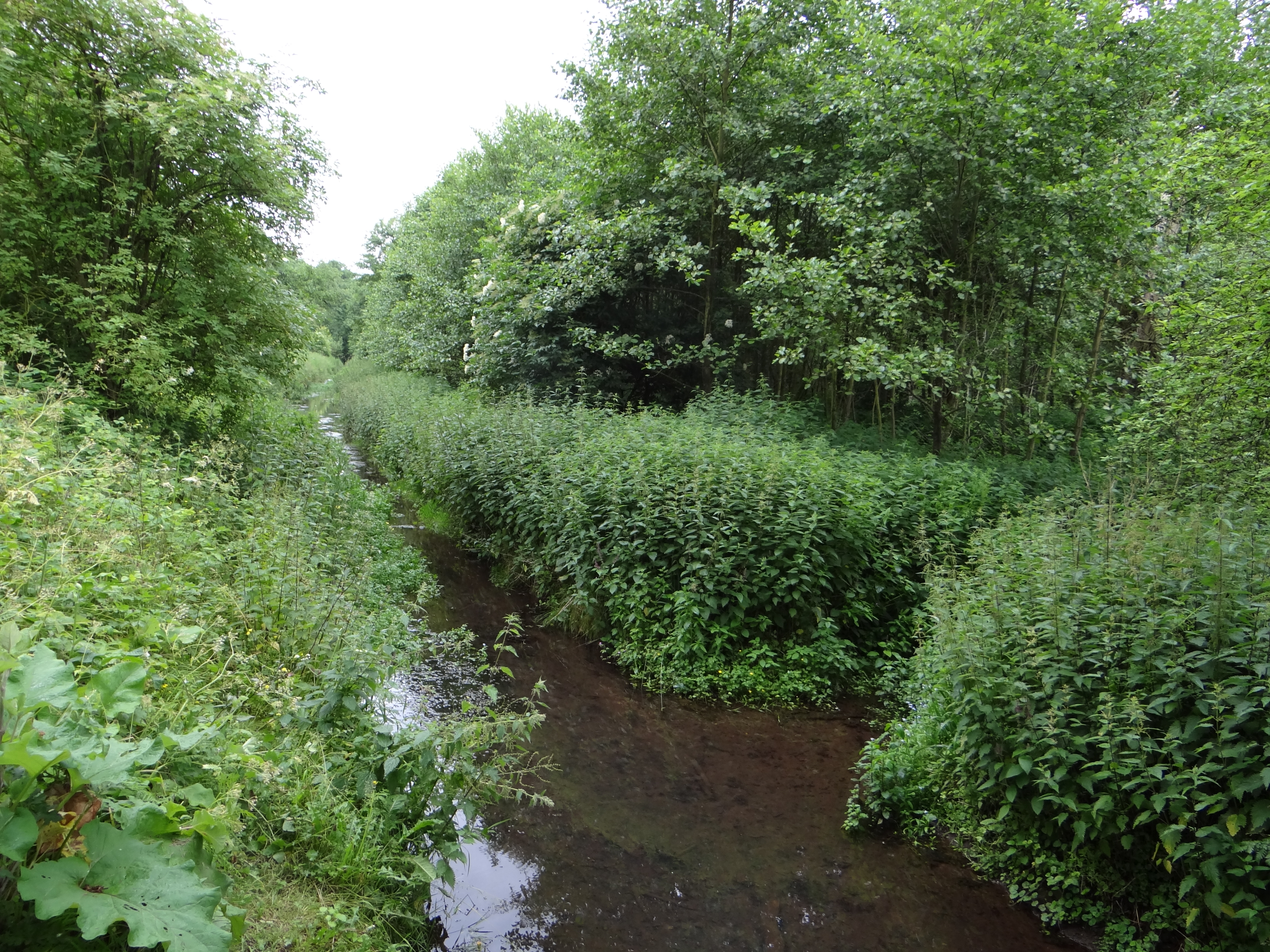 Naturschutzgebiet "Der Meerbusch" zwischen Meerbusch-Büderich und Kaarst